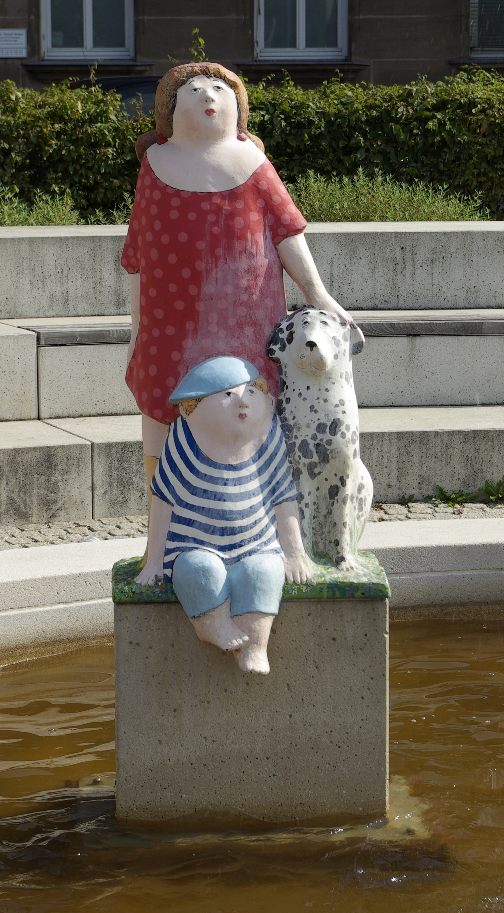 Der Brunnen in der Billinganlage in Fürth. Figuren von WP:Karl-Heinz Richter